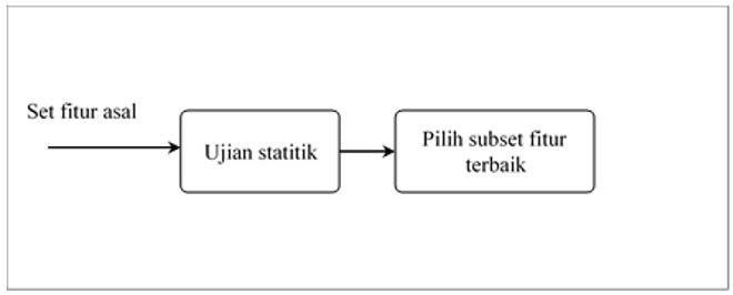 Proses pemilihan fitur kaedah penapis